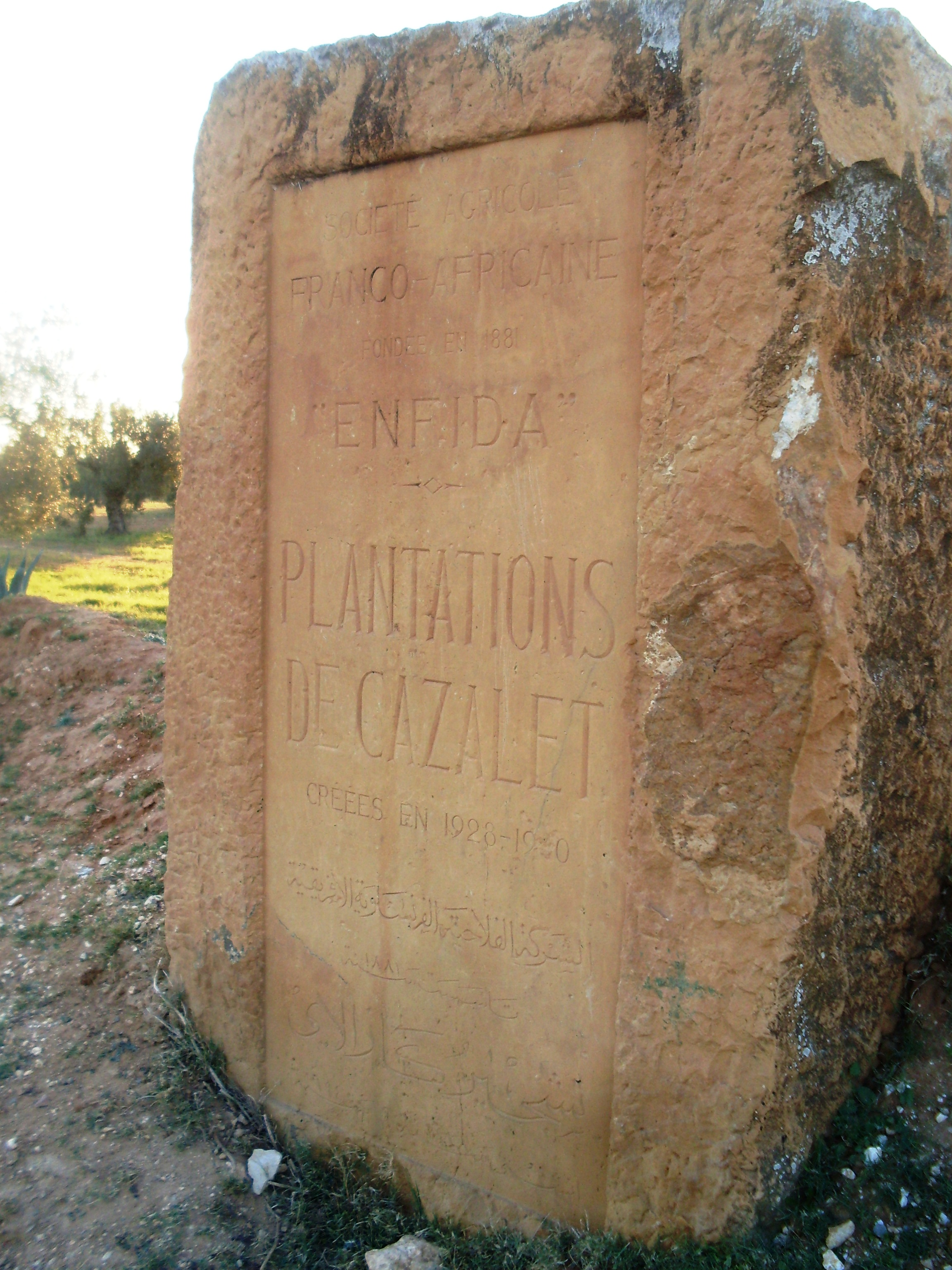 plantations de cazalet de la société franco-africaine d'Enfida